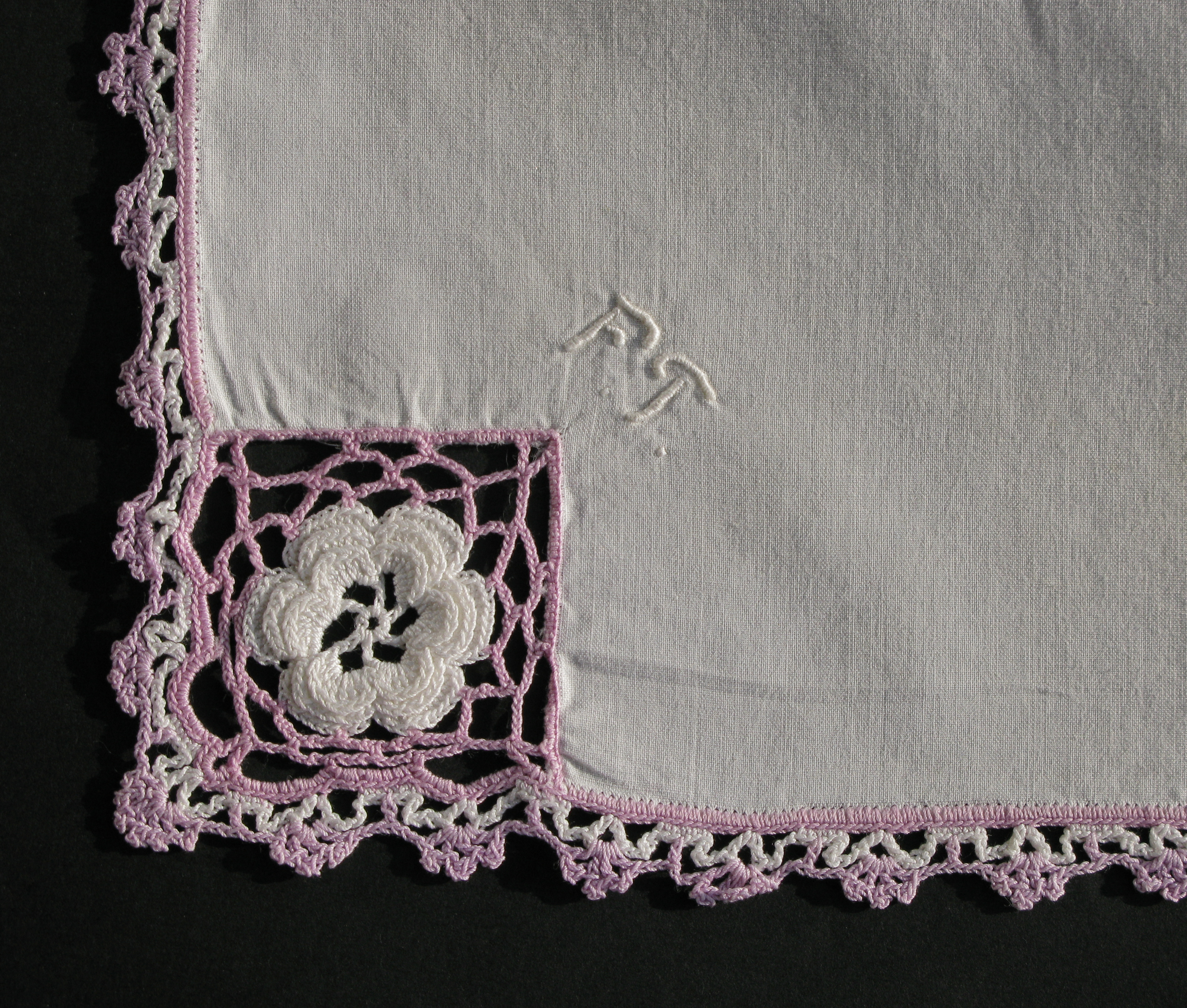 Mit Häkelspitze verzierter Rand eines Taschentuches